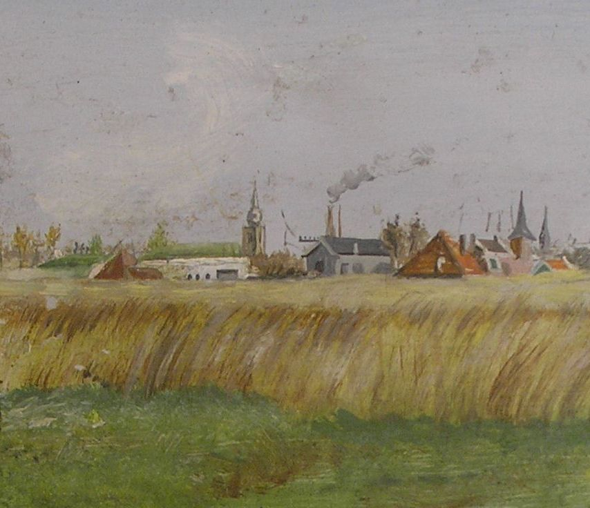 Detail panoramaschildering in het Fort bij Krommeniedijk, waarop het fort bij Marken-Binnen zichtbaar is.